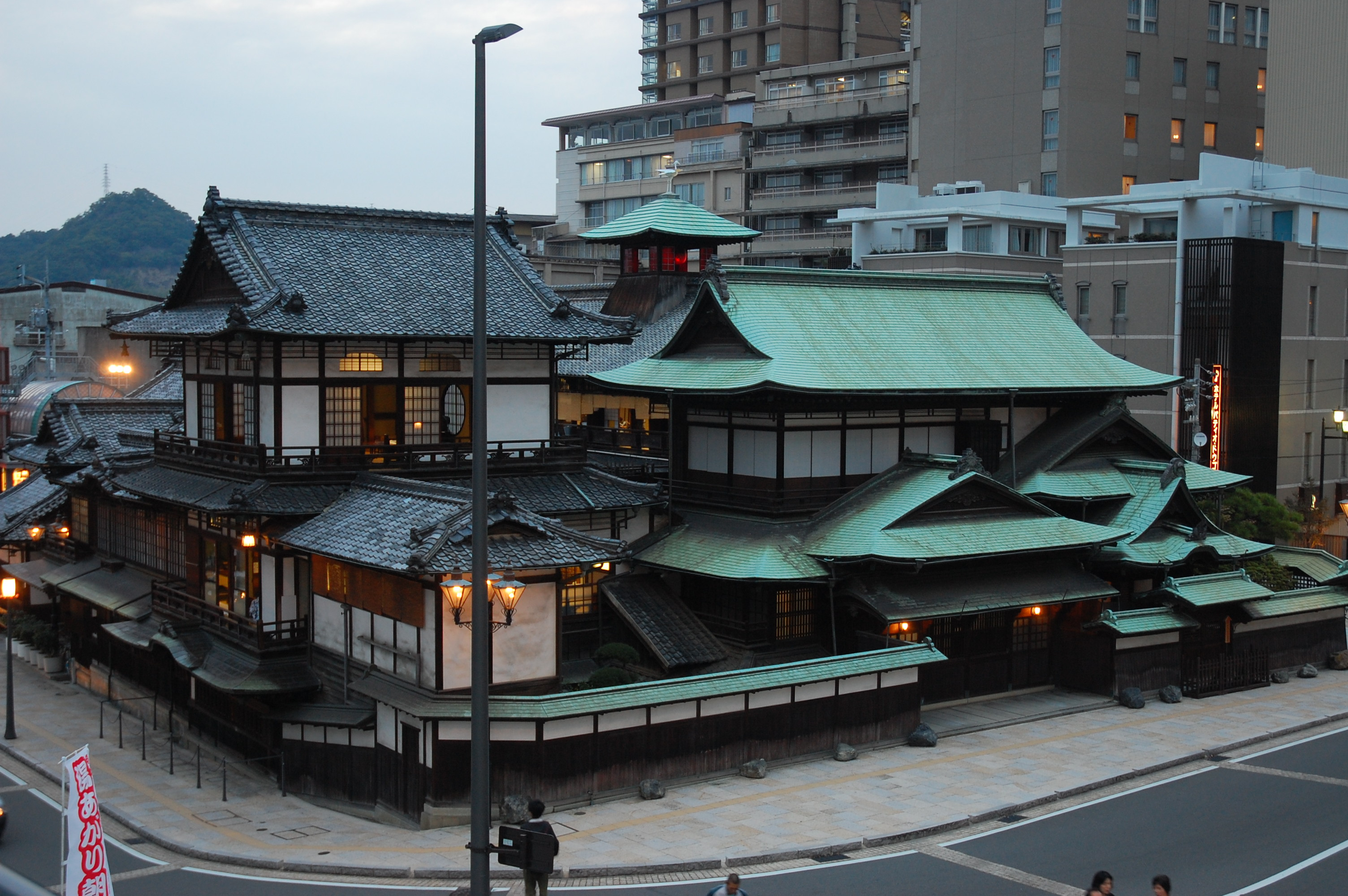 道後温泉本館。